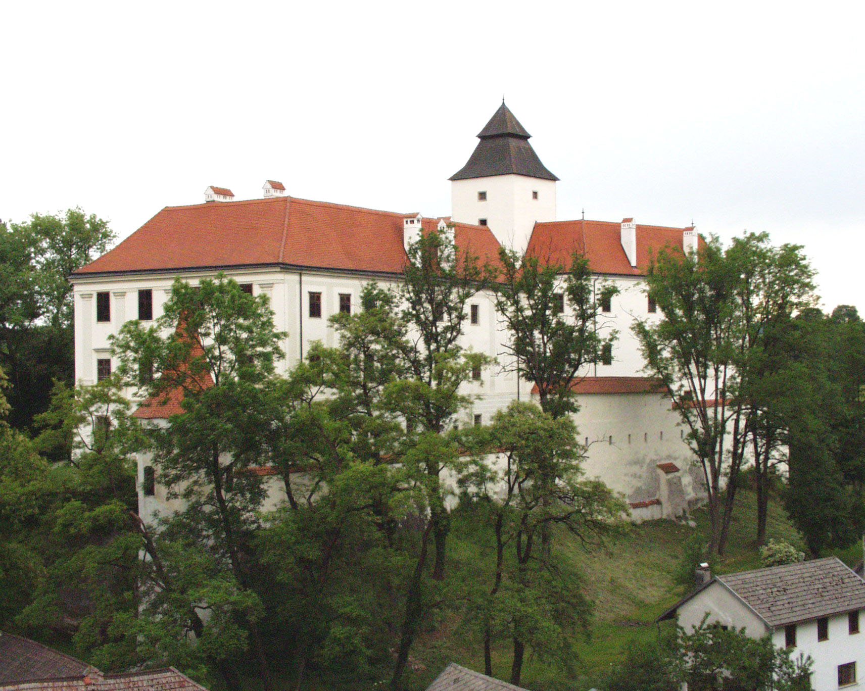 Schloss Seisenegg im Juni 2000